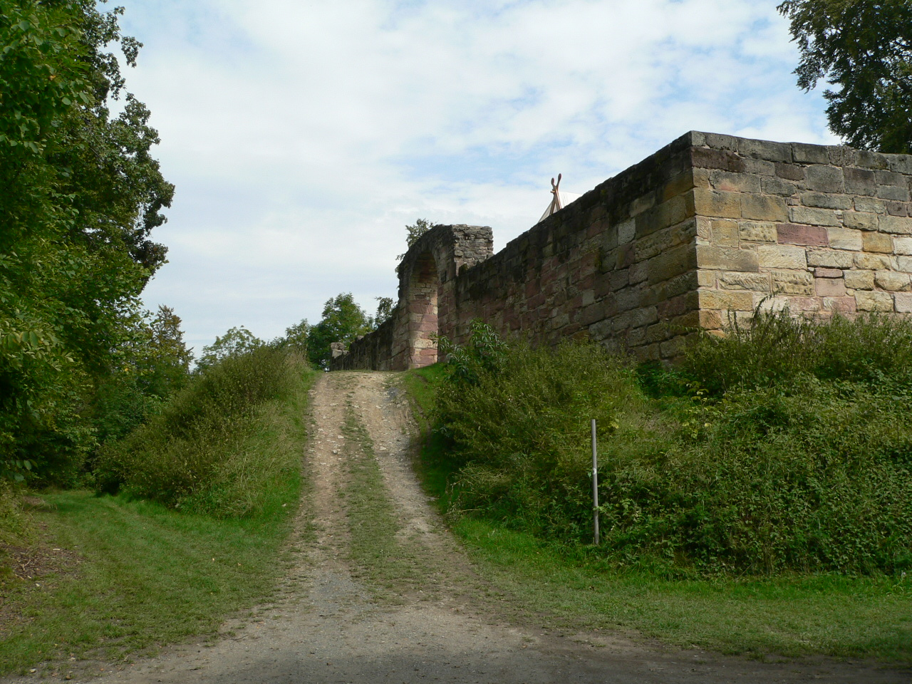 Lauterburg in Rödental-Oberwohlsbach